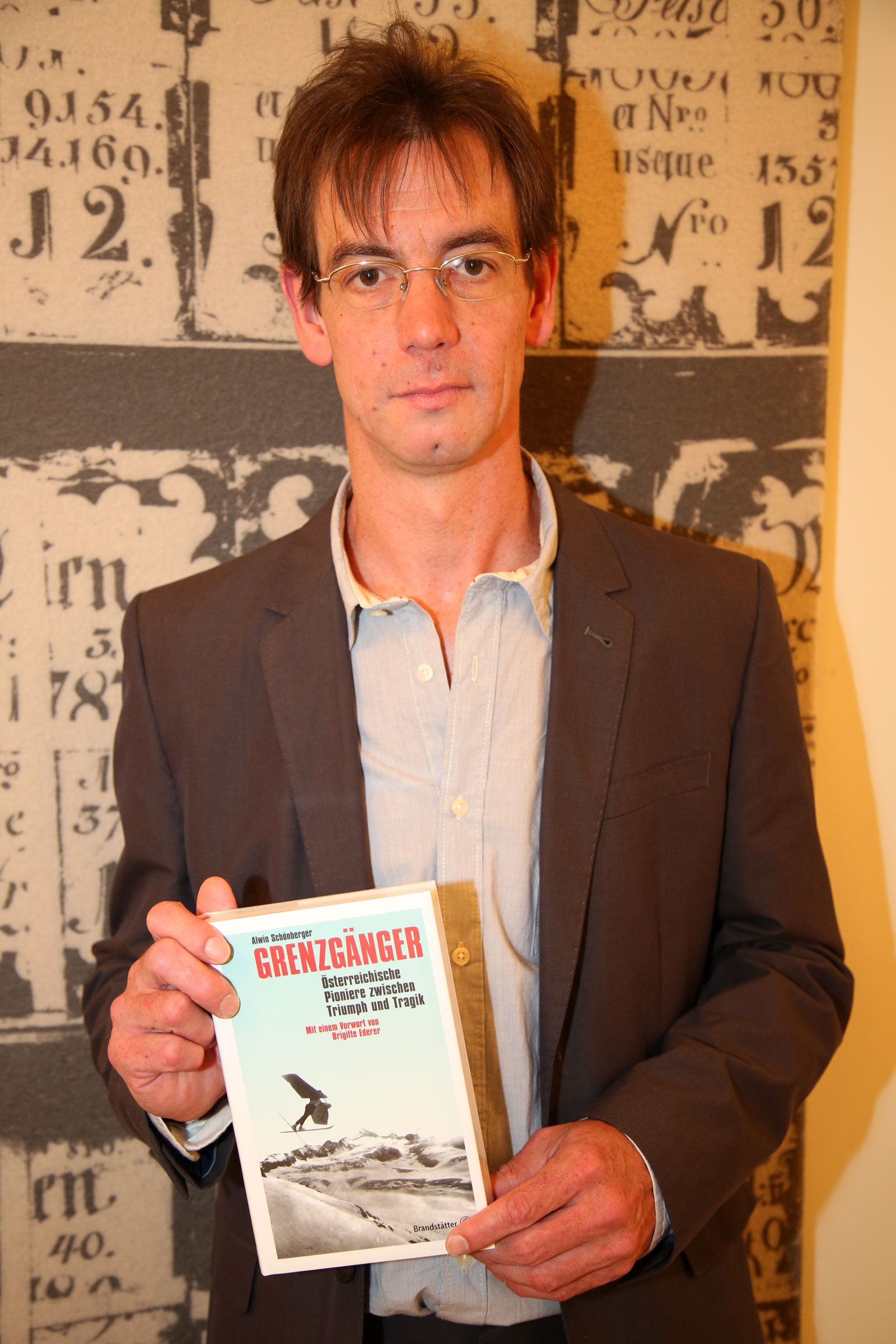 Schönberger_Alwin-7191